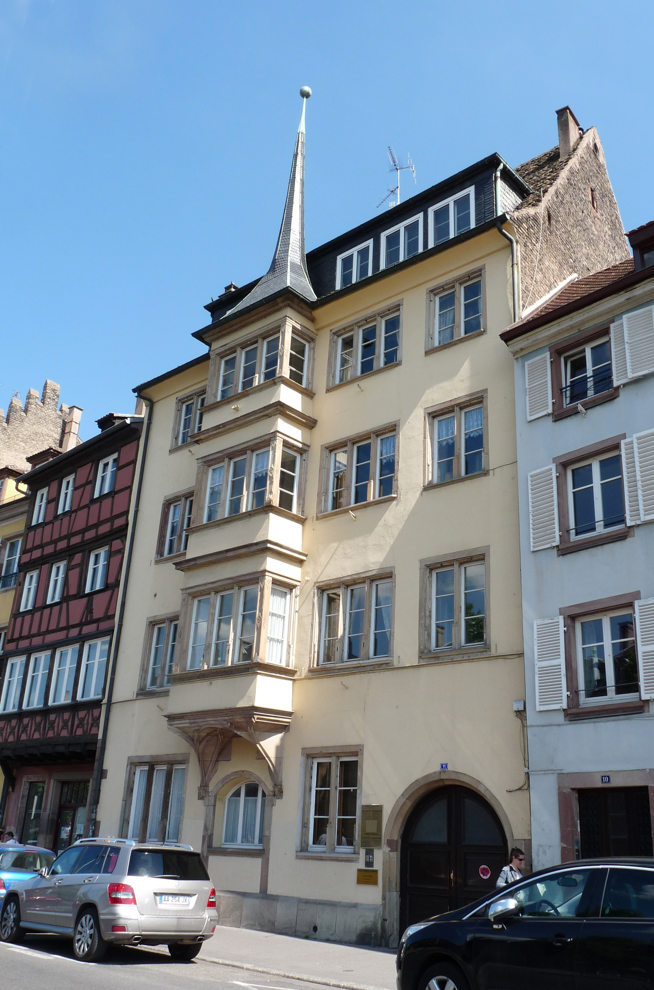 Immeuble, 11, quai des Bateliers, Strasbourg.